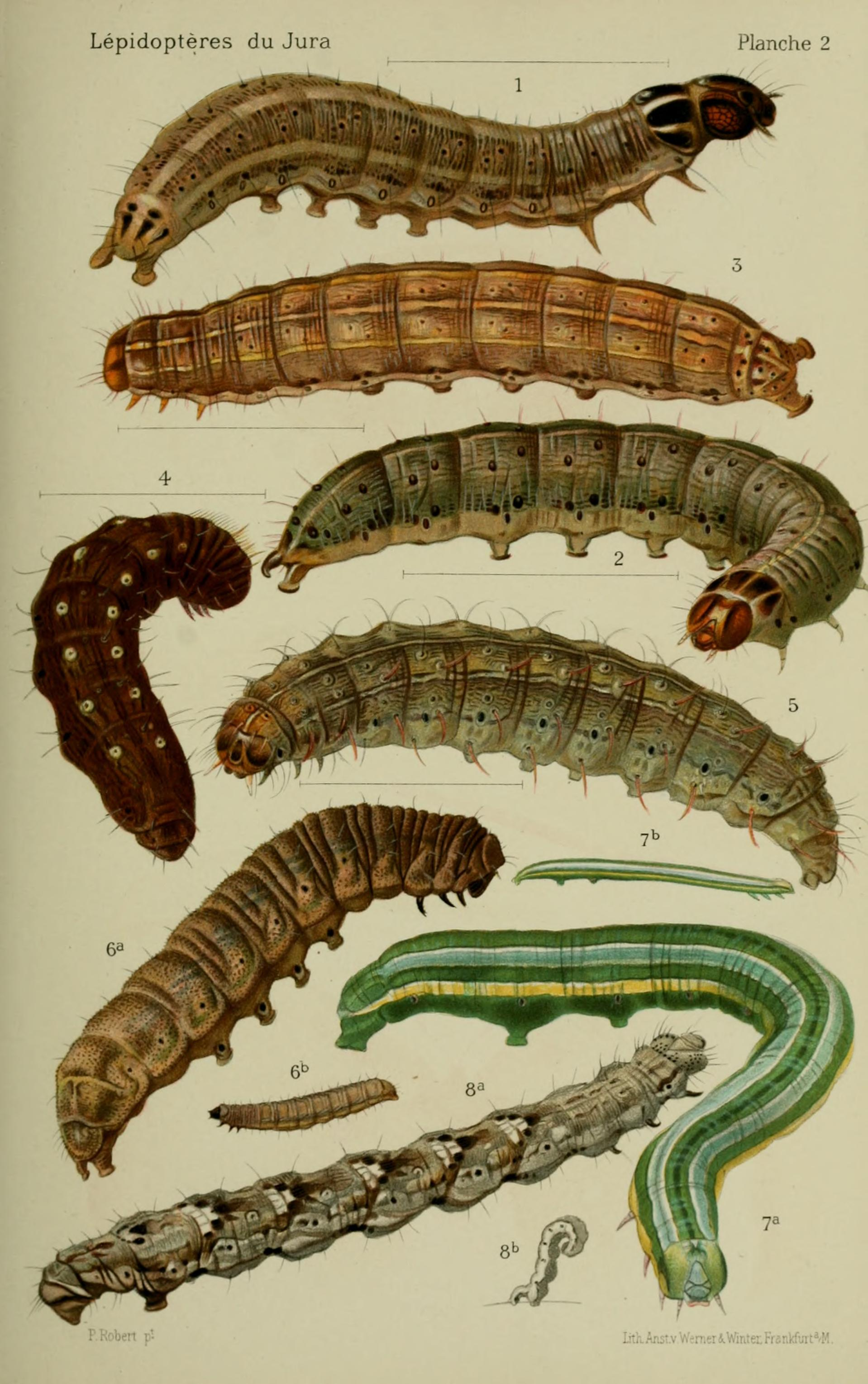 Planche II Fig. 1. Hadena basilinea, S. V. Fig. 2. Hadena hepatica, S. V. Fig. 3. Hadena illyrica, S. V. Fig. 4. Caradrina respersa, S. V. Fig. 5. Caradrina alsines, S. V. Fig. 6, a, b. Caradrina gluteosa, S. V. Fig. 7, a, b. Pungeleria capreolaria, S. V. Fig. 8, a, b. Cidaria tophaceata, S. V. Title: Bulletin de la Société Neuchâteloise des Sciences Naturelles Year: -1898 (-180s) Authors: Soci neuchloise des sciences naturelles Subjects: Science; Natural history Publisher: Neuchl : Impr. wolfrath Text Appearing Before Image: Lépidoptères du Jura Planche 2 Text Appearing After Image: â Roben p' lith.Anst.v WemsriWimÅFrankfurt^M